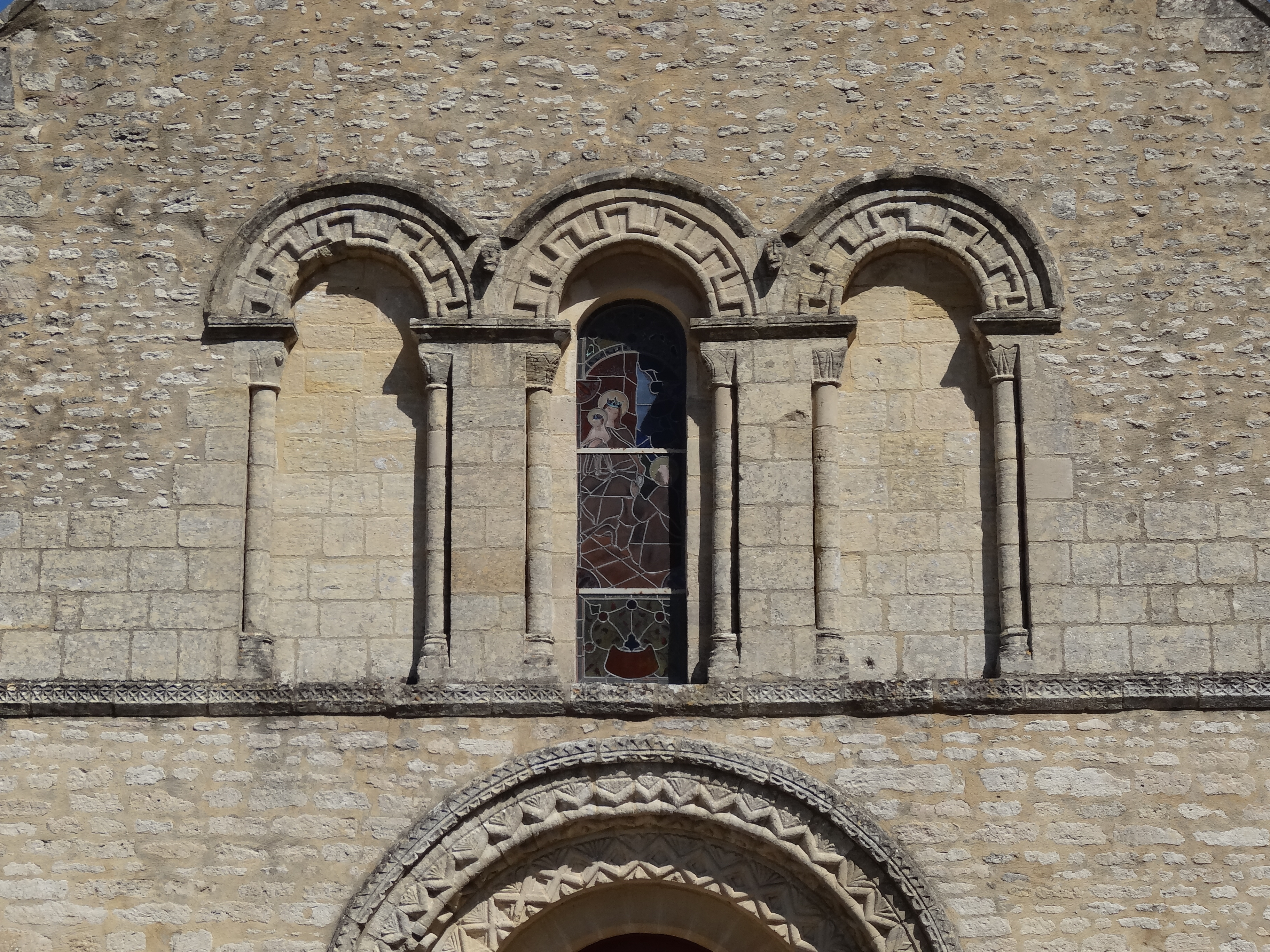 Cresserons (14) la façade occidentale de l'église est ornée d'un triplet de baies en plein-cintre de mêmes dimensions. La fenêtre et les deux baies aveugles sont encadrées par des colonnettes et leurs archivoltes sont ornées de frettes crénelées.